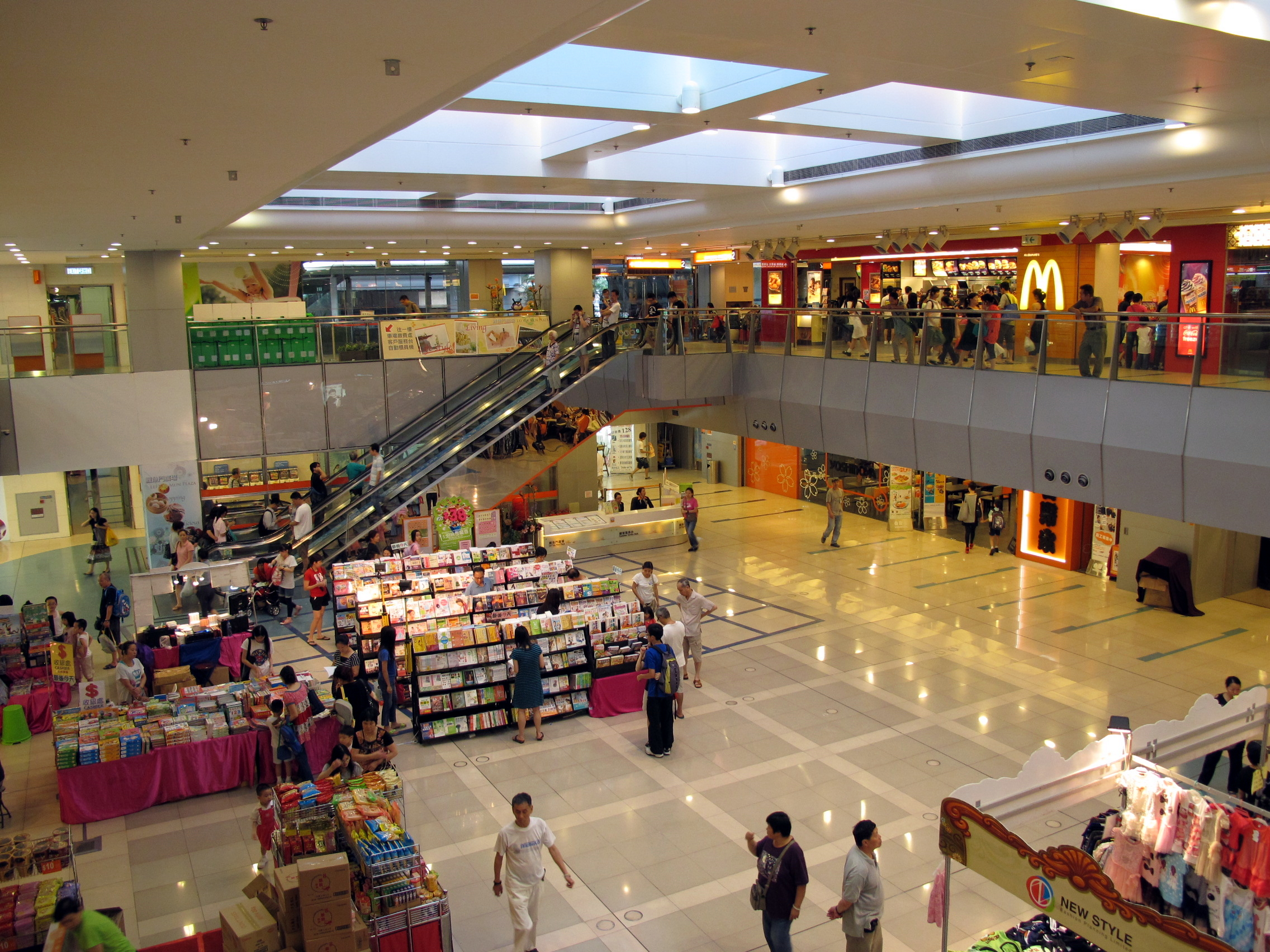 Lei Yue Mun Plaza Atrium 鯉魚門廣場